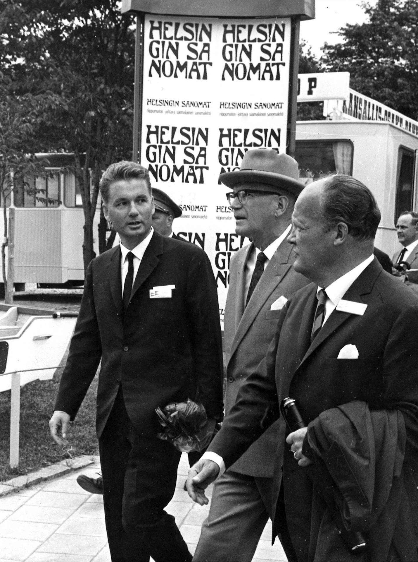 Presidentti Kekkonen tutustui Turun messuihin toimitusjohtaja Heikki Löyttyniemen (vas.) ja maaherra Esko Kulovaaran (oik.) seurassa.